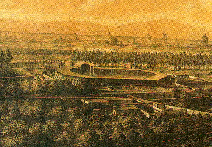 Vista panorámica de la Plaza de Toros de Acho, en el Rímac, en un grabado publicado en el libro “Lima, apuntes históricos, descriptivos, estadísticos y de costumbres” de Manuel Atanasio Fuentes, París, 1867. Foto: Archivo de la Editorial PEISA, reproducida en el Atlas Regional del Perú, Tomo 14, Lima – Callao, página 91, Editado por PEISA y el Grupo La República.